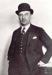 англійський композитор, художник